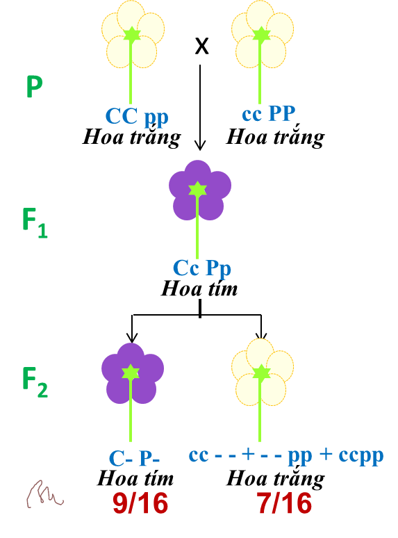 Sơ đồ tương tác gen ở thí nghiệm Bateson-Punnett.